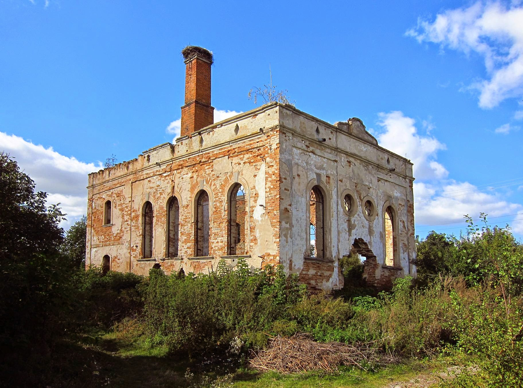 Синагога в Пробежной.